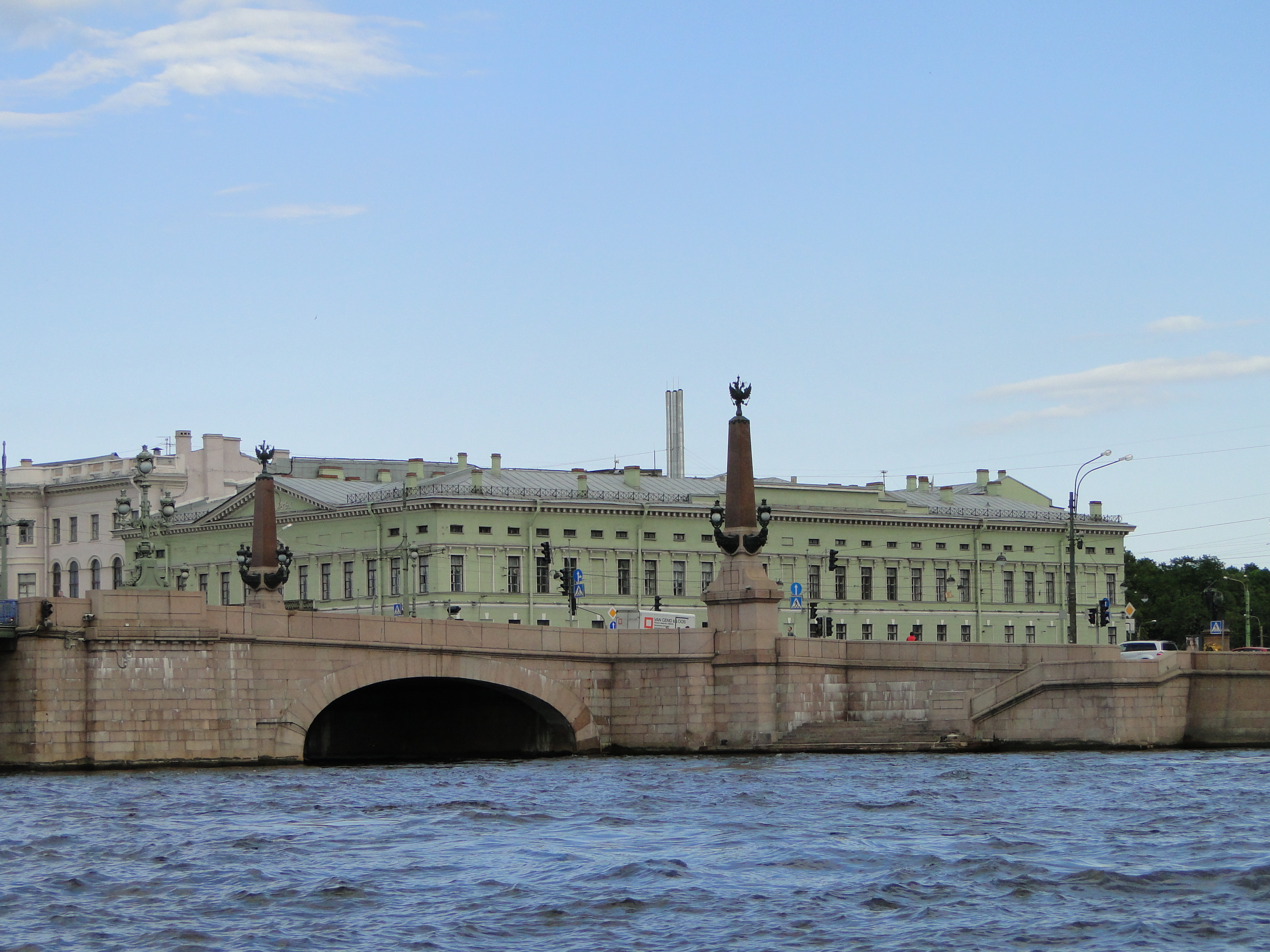 Троицкий мост и Дом Салтыкова